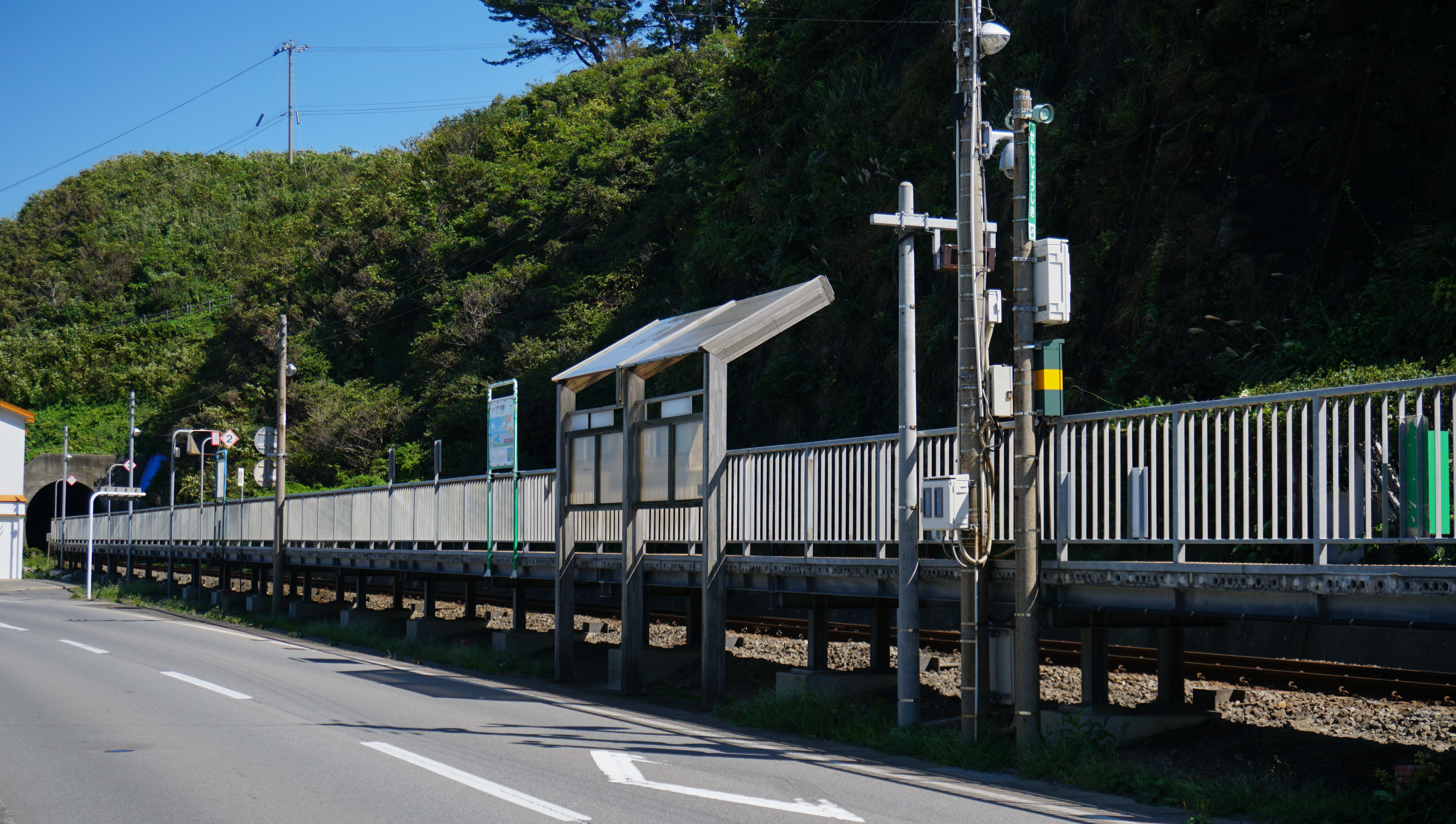 五能線 千畳敷駅（青森県西津軽郡深浦町）